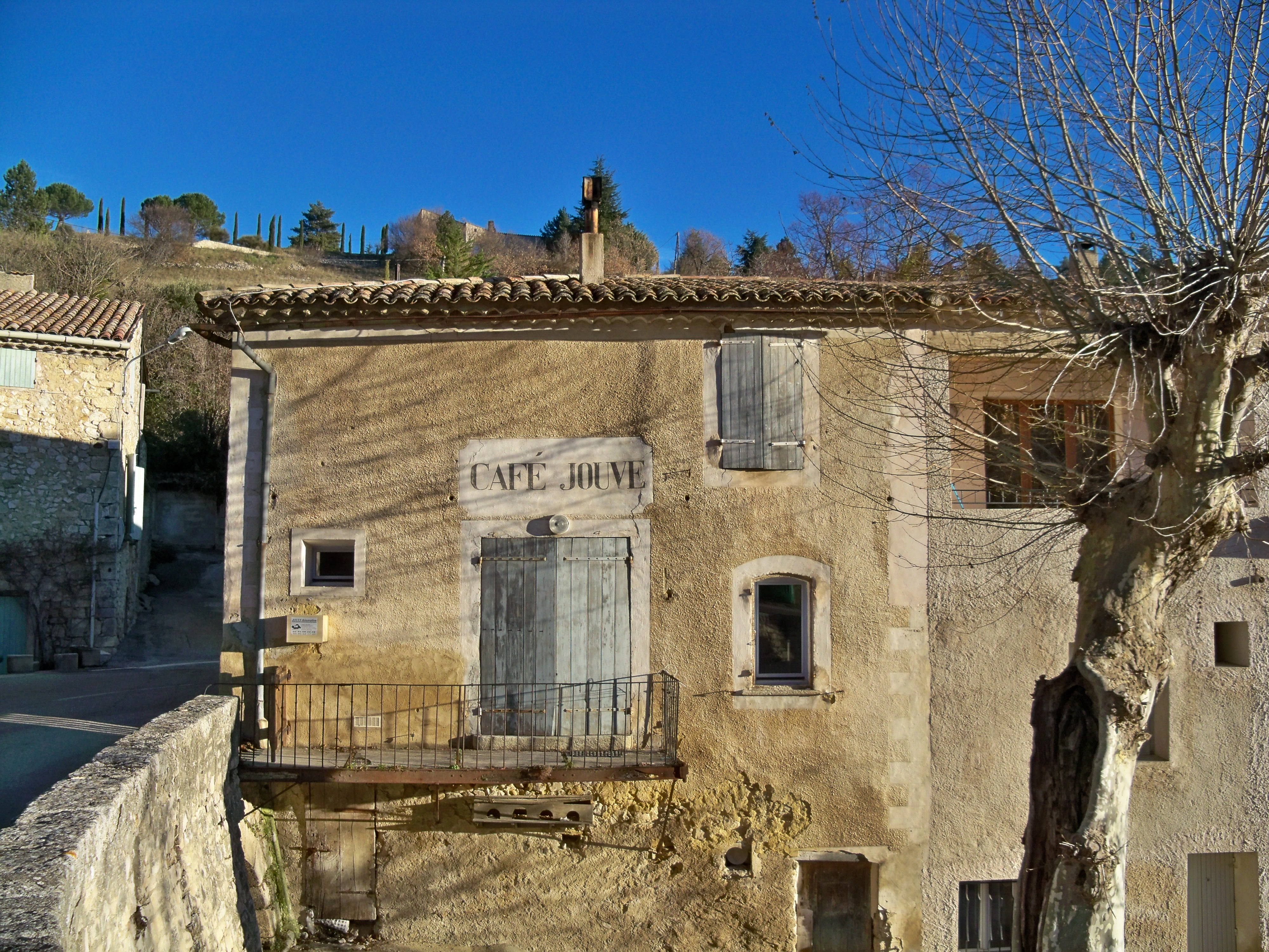 Ancien Café Jouve à Aurel, Vaucluse, France.